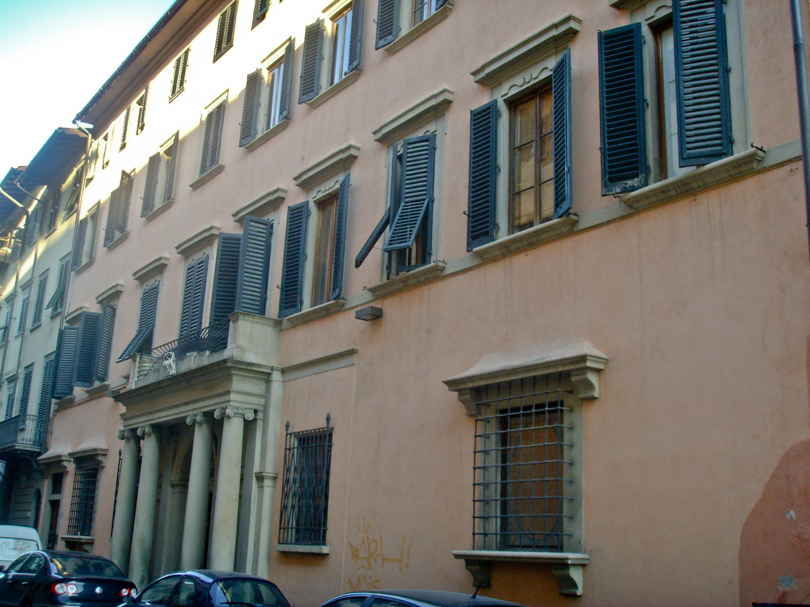 Casino Salviati-Borghese palace in Florence